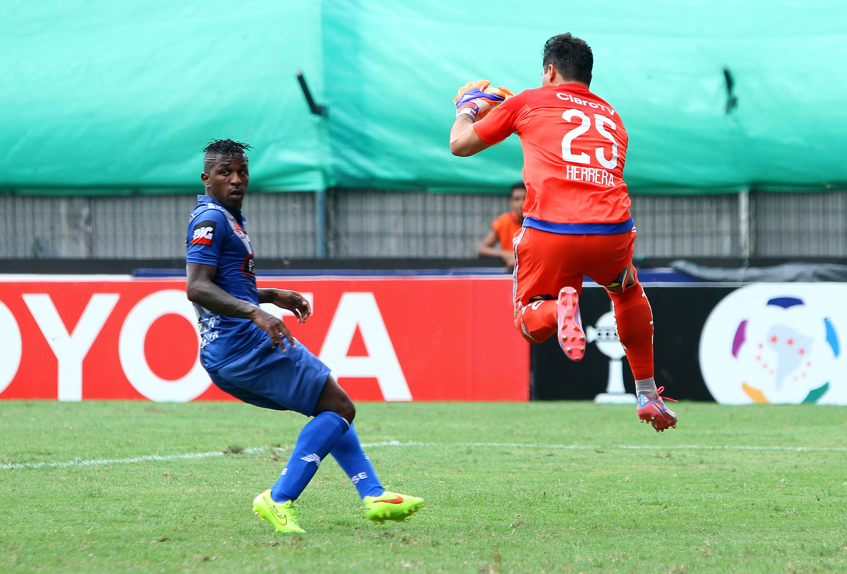 Guayaquil, 22 de abr (Andes).-Emelec gana 2x0 a la Universidad de Chile y clasifica a los octavos de la Copa Libertadores, en la gráfica el portero Jhonny Herrera le gana el balon a Miller Bolaños delantero de Emelec Foto:César Muñoz/Andes